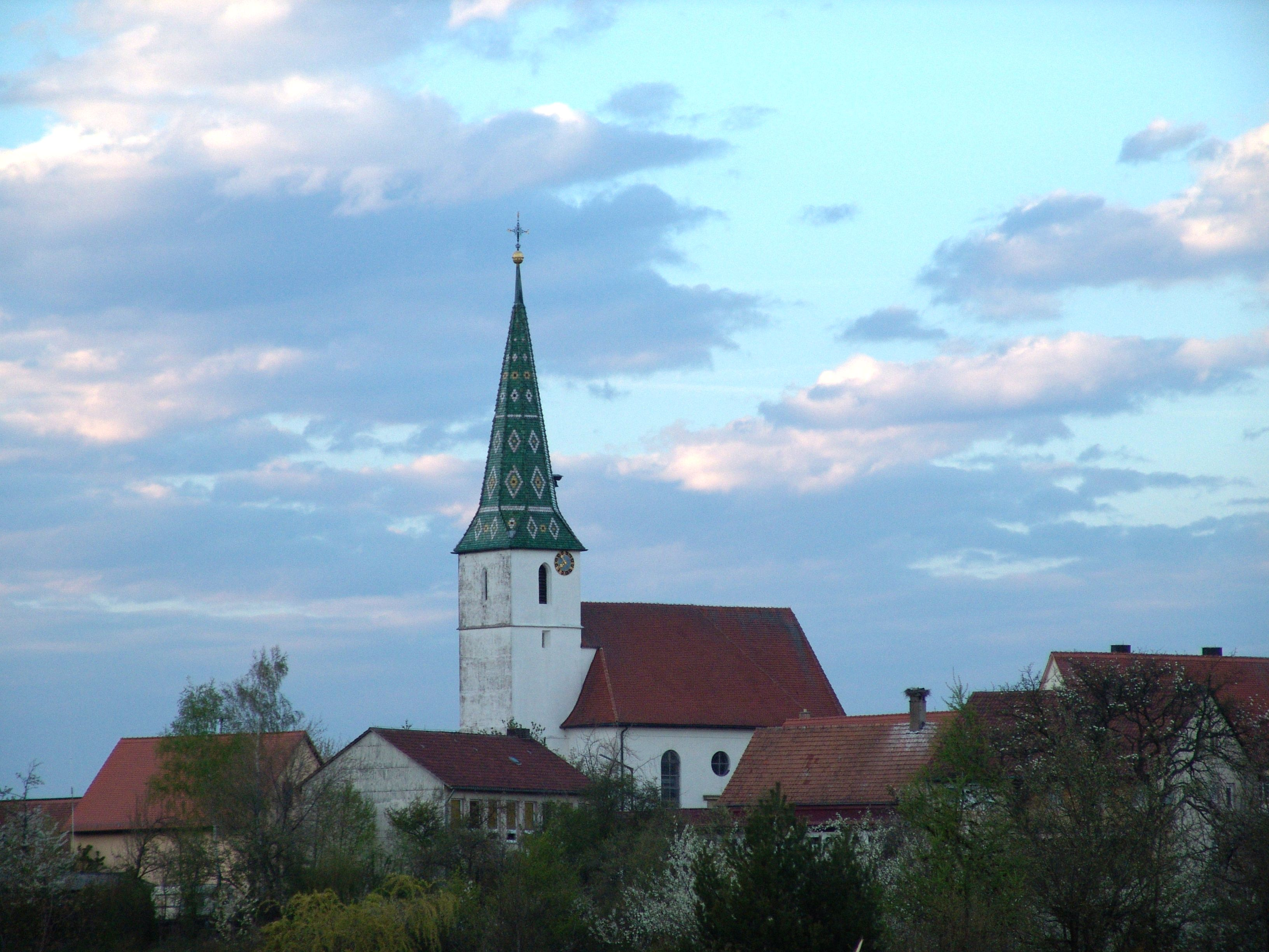 evang.-luth. Kirche St. Wenzeslaus in Weißenkirchberg